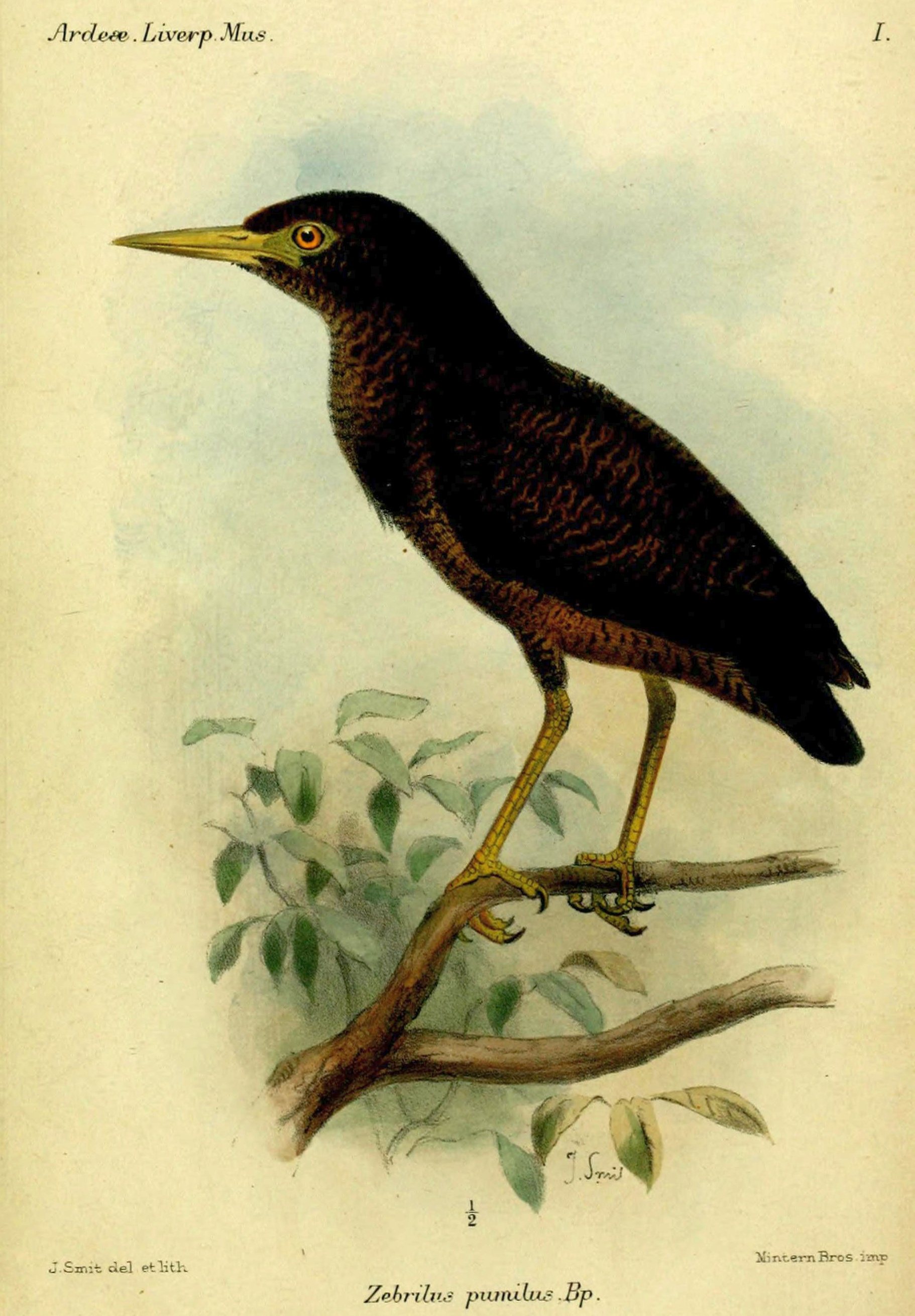 Zebrilus pumilus = syn. Zebrilus undulatus[1]